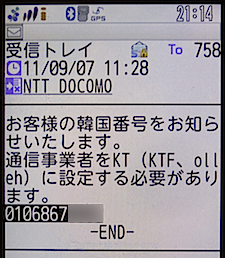 海外プラスナンバーの番号通知メール